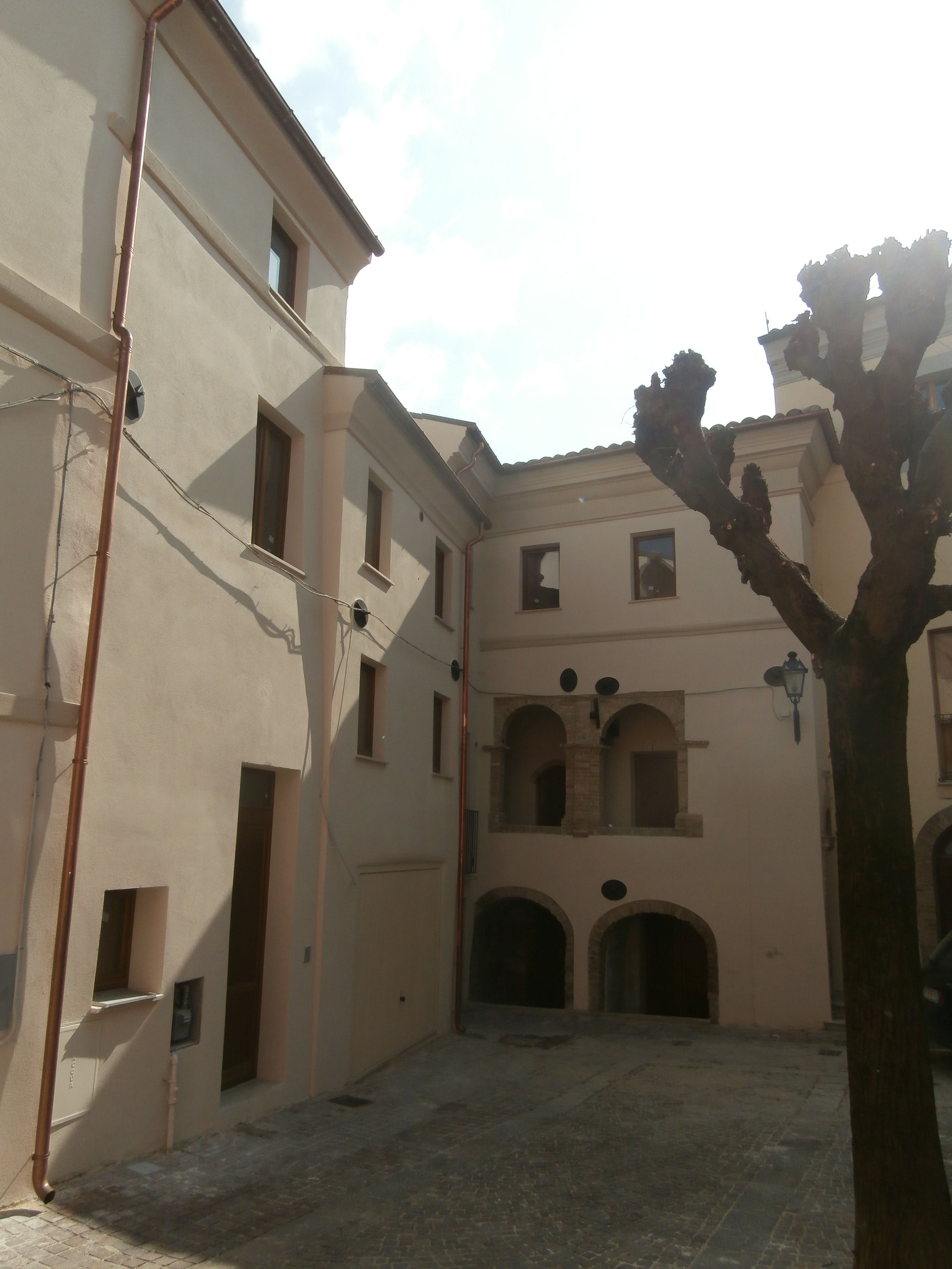 Casa vicino al Comune